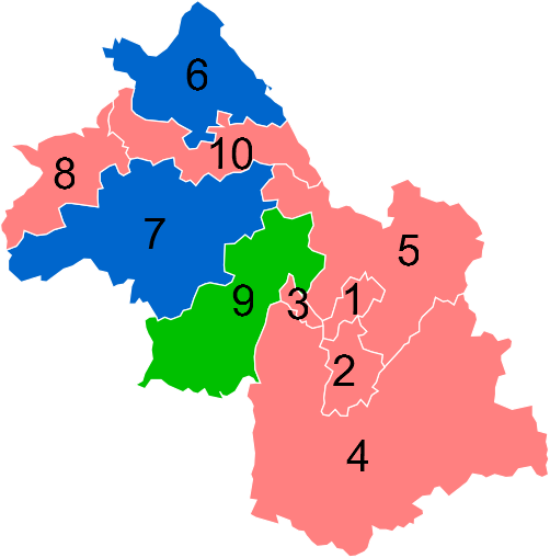 Résultats des élections législatives de l'Isère en 2012